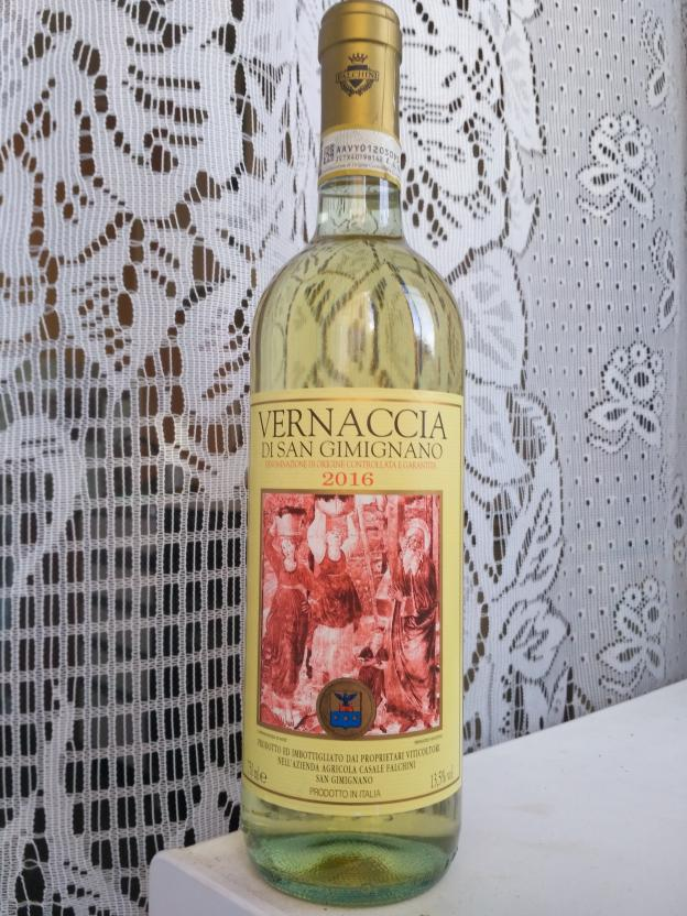 Vernaccia di San Gimignano cantina falchini.